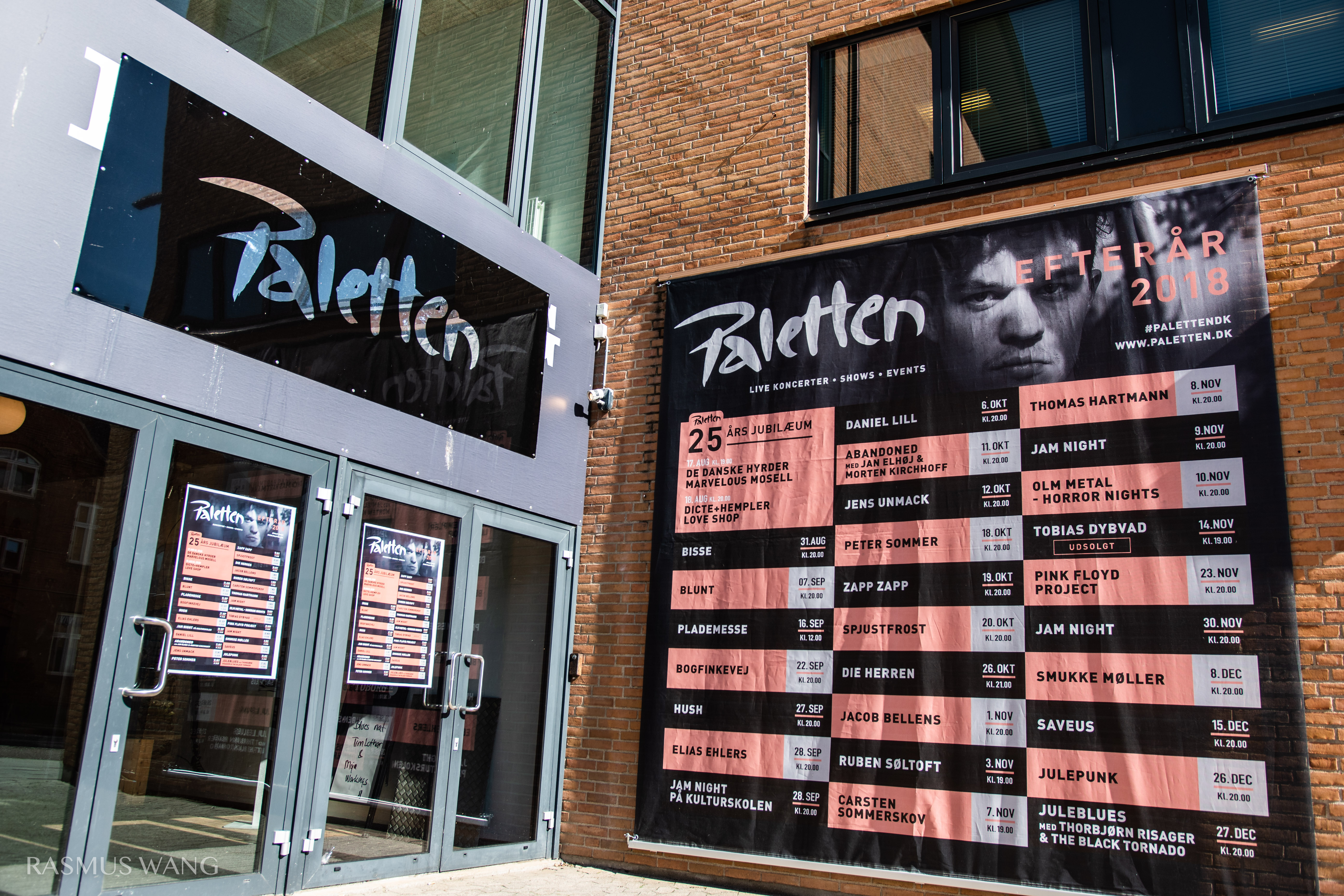 Paletten 2018 med efterårs programmet i banner. Foto: Rasmus Wang